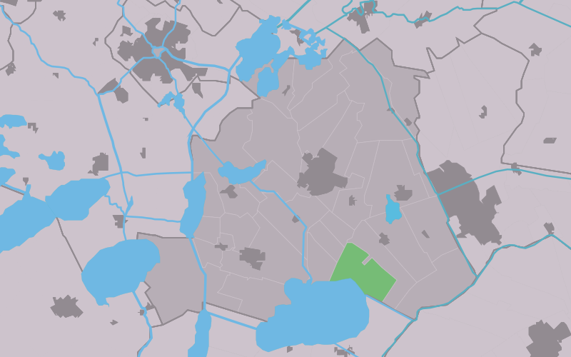 Kaartsje fan himrik fan Reahel